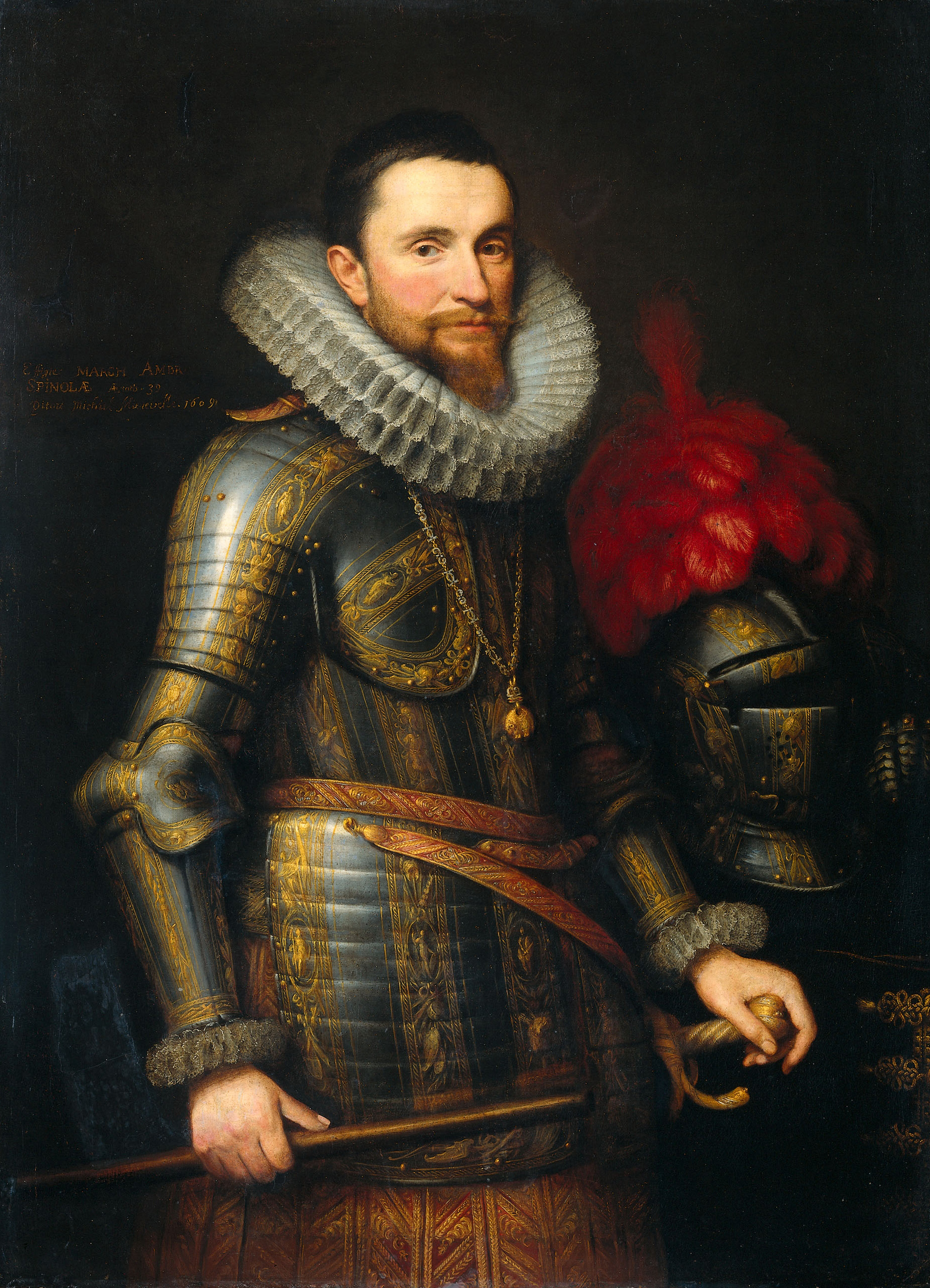 Portret van Ambrogio Spinola, opperbevelhebber der Spaanse troepen in de Zuidelijke Nederlanden. Heupstuk, staande in wapenrusting bij een tafel waarop de helm met pluimen staat. Commandostaf in de rechterhand, de linkerhand op het gevest van zijn degen. Aan een ketting om de hals het embleem van de Orde van het Gulden Vlies.